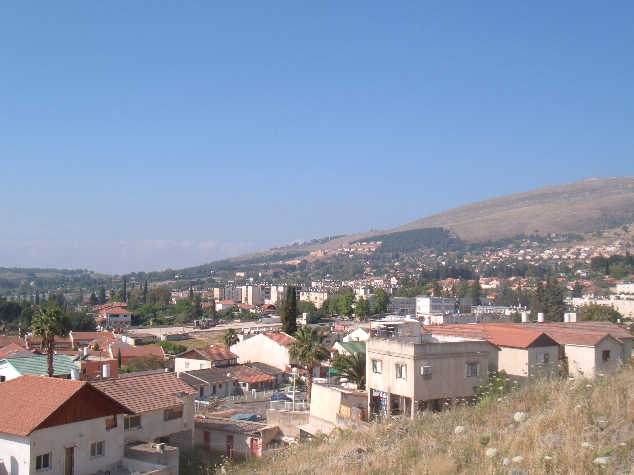 Hazor Hagelilit, Israel, view from the northern neighborhood.חצור הגלילית, ישראל, מבט מהשכונה הצפונית